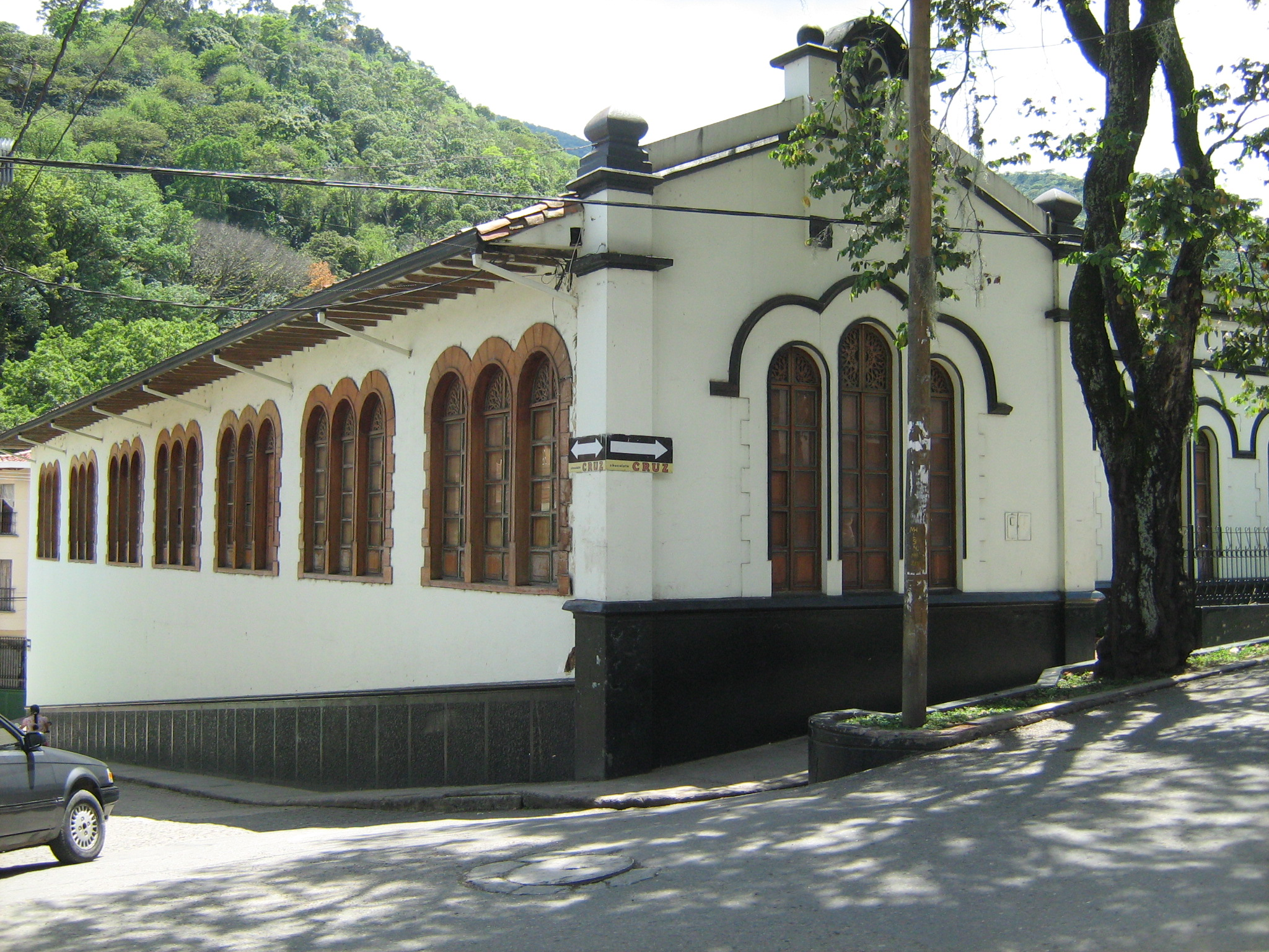 Casa de la Cultura del Municipio de Ciudad Bolívar, Antioquia, Colombia